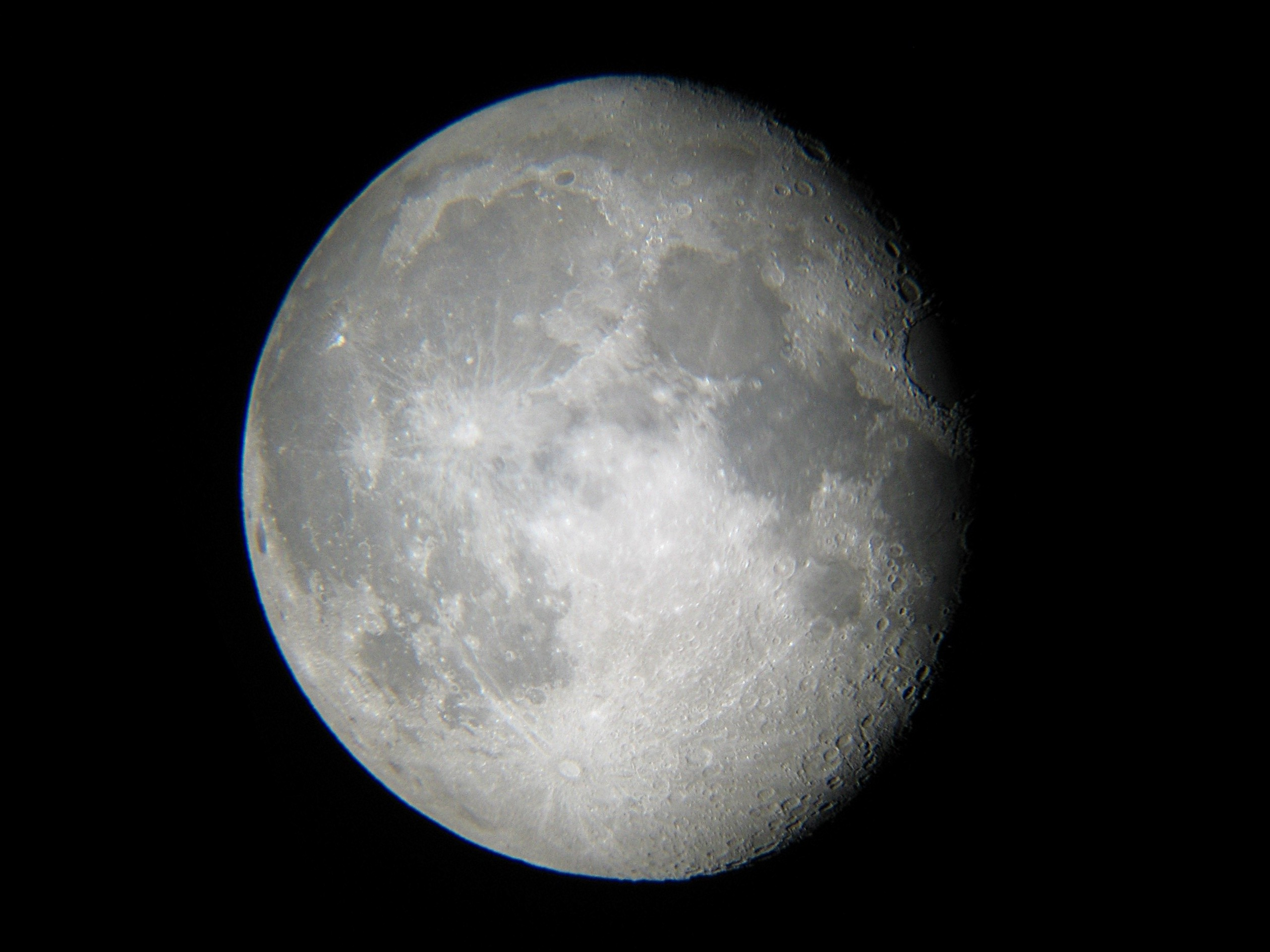 Mond, aufgenommen mit 150mm Spiegelteleskop. Das Bild ist von der Qualität nicht optimal (schlechte atmosphärische Bedingungen) und darf gerne durch ein besseres ersetzt werden. Fotograf: Stephan Brunker